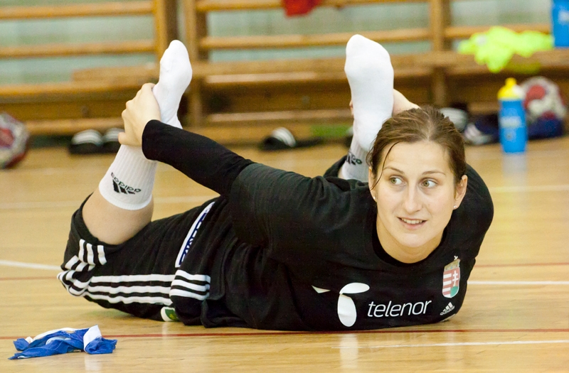 Herr Orsolya válogatott magyar kézilabdázó.